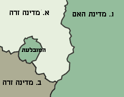 תרגם לעברית של מפת המובלעת hebrew version of Image:Exclave.png